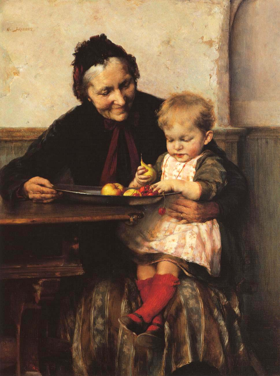 "Grandma's Favorite" - "Η Αγαπημένη της Γιαγιάς"